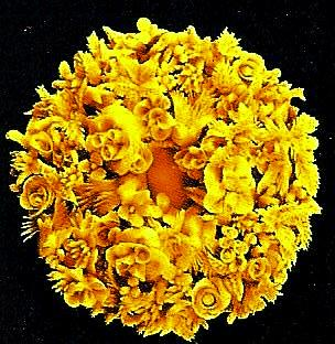 Sardegna - pane votivo.